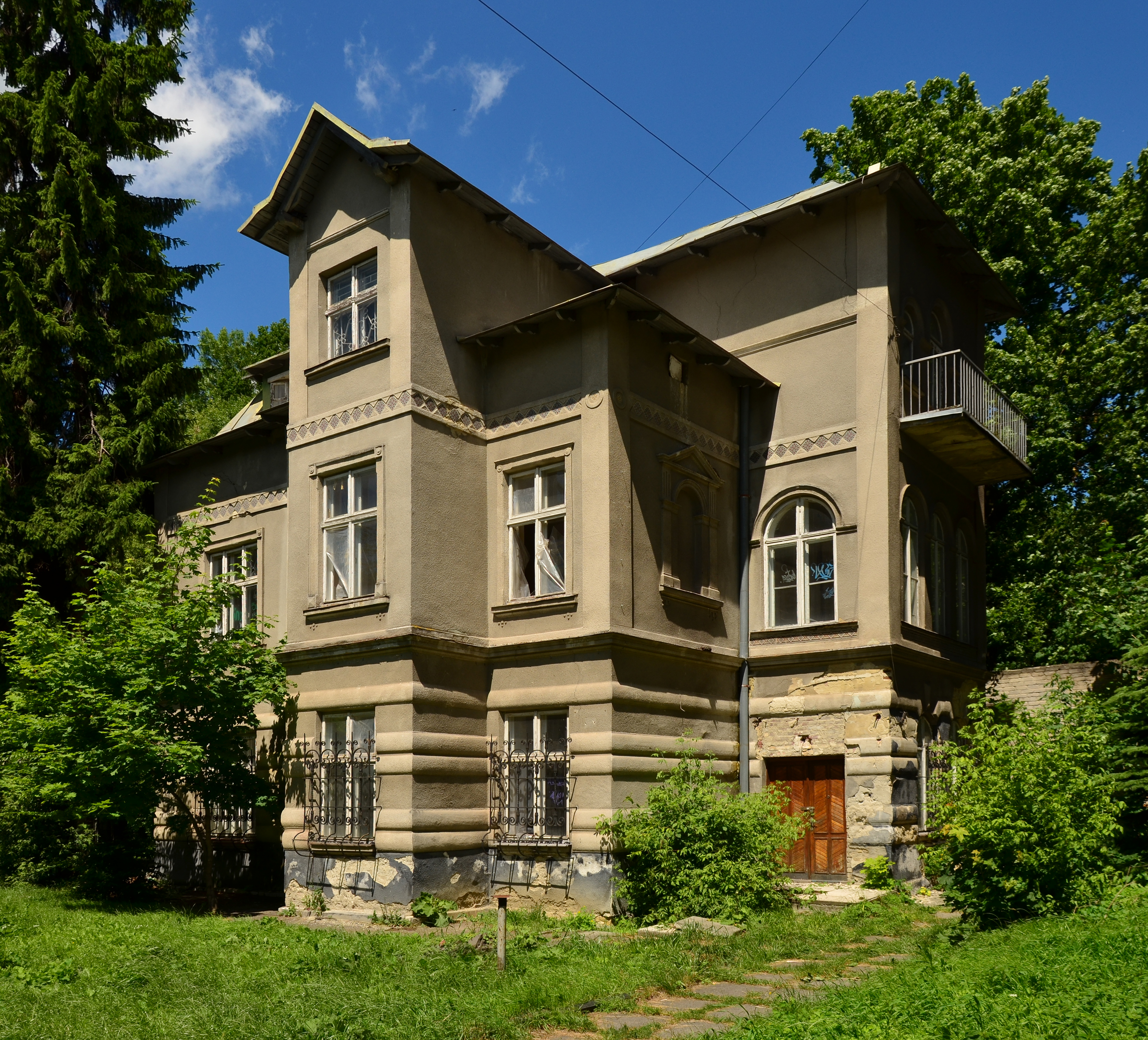 Будинок № 96 на вулиці Чупринки у Львові.